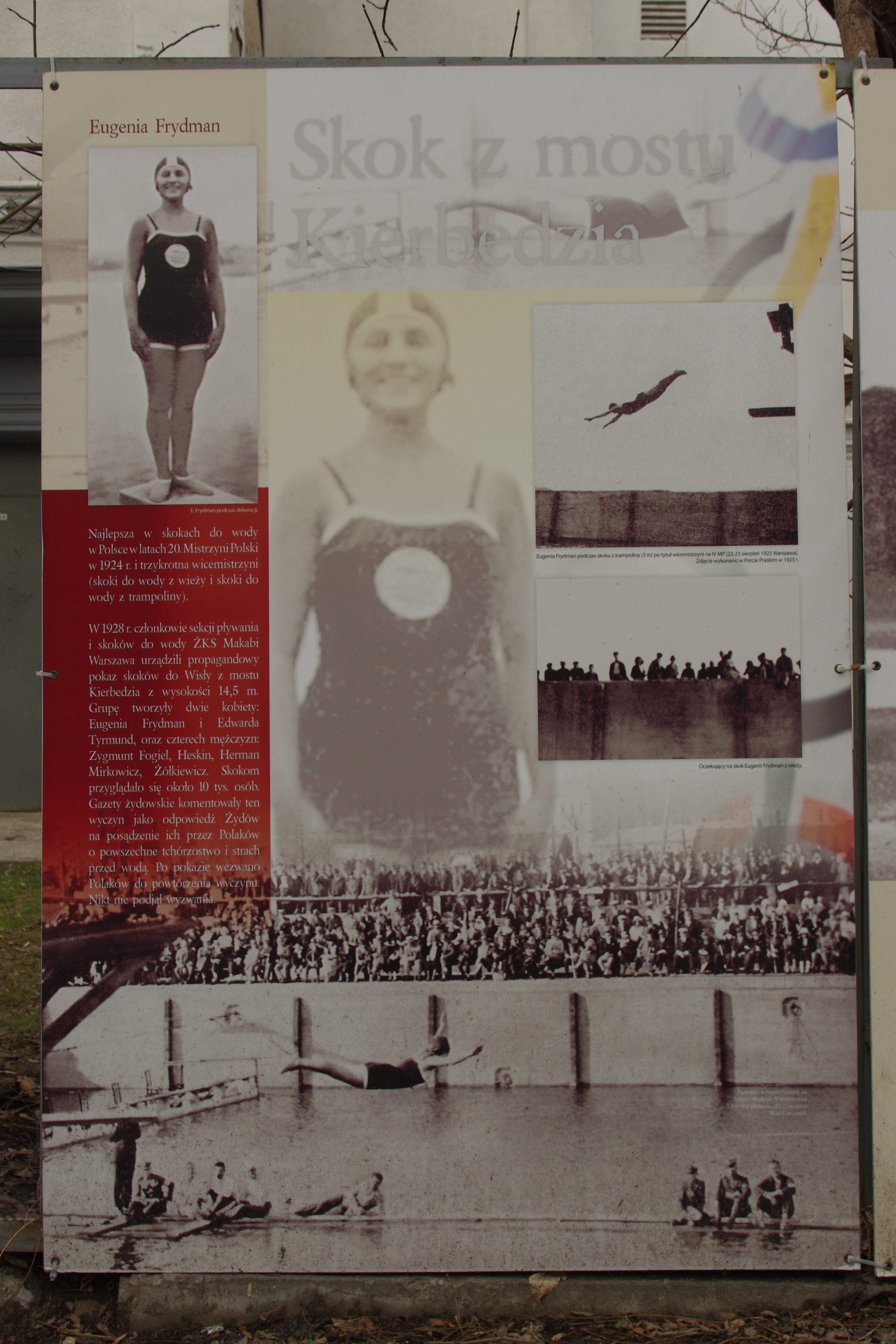 Fragment wystawy plenerowej ”Sport Żydowski w przedwojennej Warszawie” autorstwa dr Jarosława Rokickiego, przygotowanej przez Fundacje im. prof. Mojżesza Schorra, a prezentowanej na przełomie 2012/2013 r., przy ul. Twardej 6 w Warszawie. Na fotografii fragment tablicy pt. "Skok z mostu Kierbedzia". Na tablicy widoczna Eugenia Frydman.